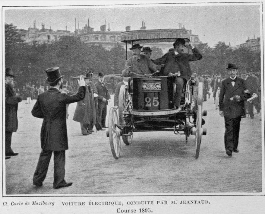 Voiture électrique de Charles Jeantaud, au départ de Paris-Bordeaux-Paris 1895.